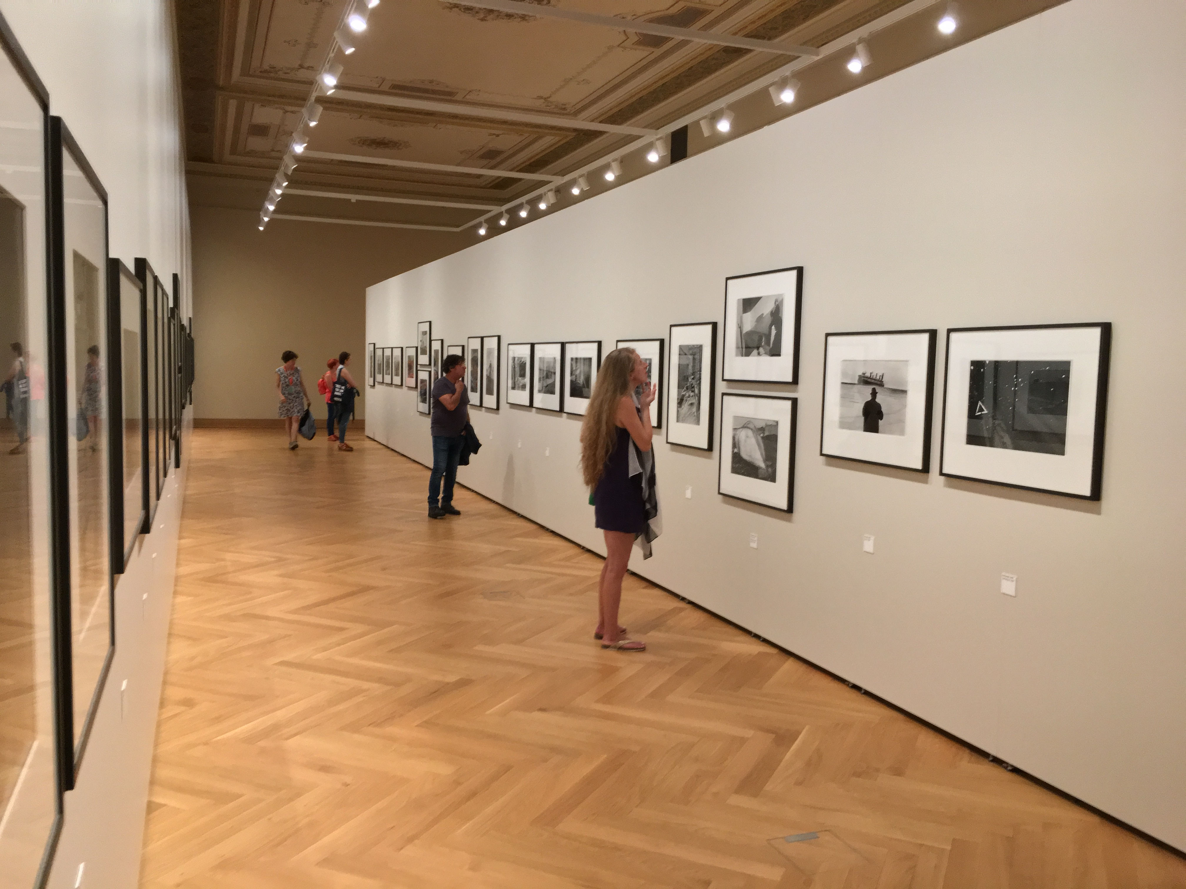 Výstava: Návraty Autor koncepce: Josef Koudelka 22. březen—23. září 2018 Uměleckoprůmyslové museum v Praze Kurátorka: Irena Šorfová Architektonické řešení: Emil Zavadil Grafické řešení: Aleš Najbrt Koordinace: Dušan Seidl – UPM Publikace k výstavě: UPM a nakladatelství KANT – Karel Kerlický.